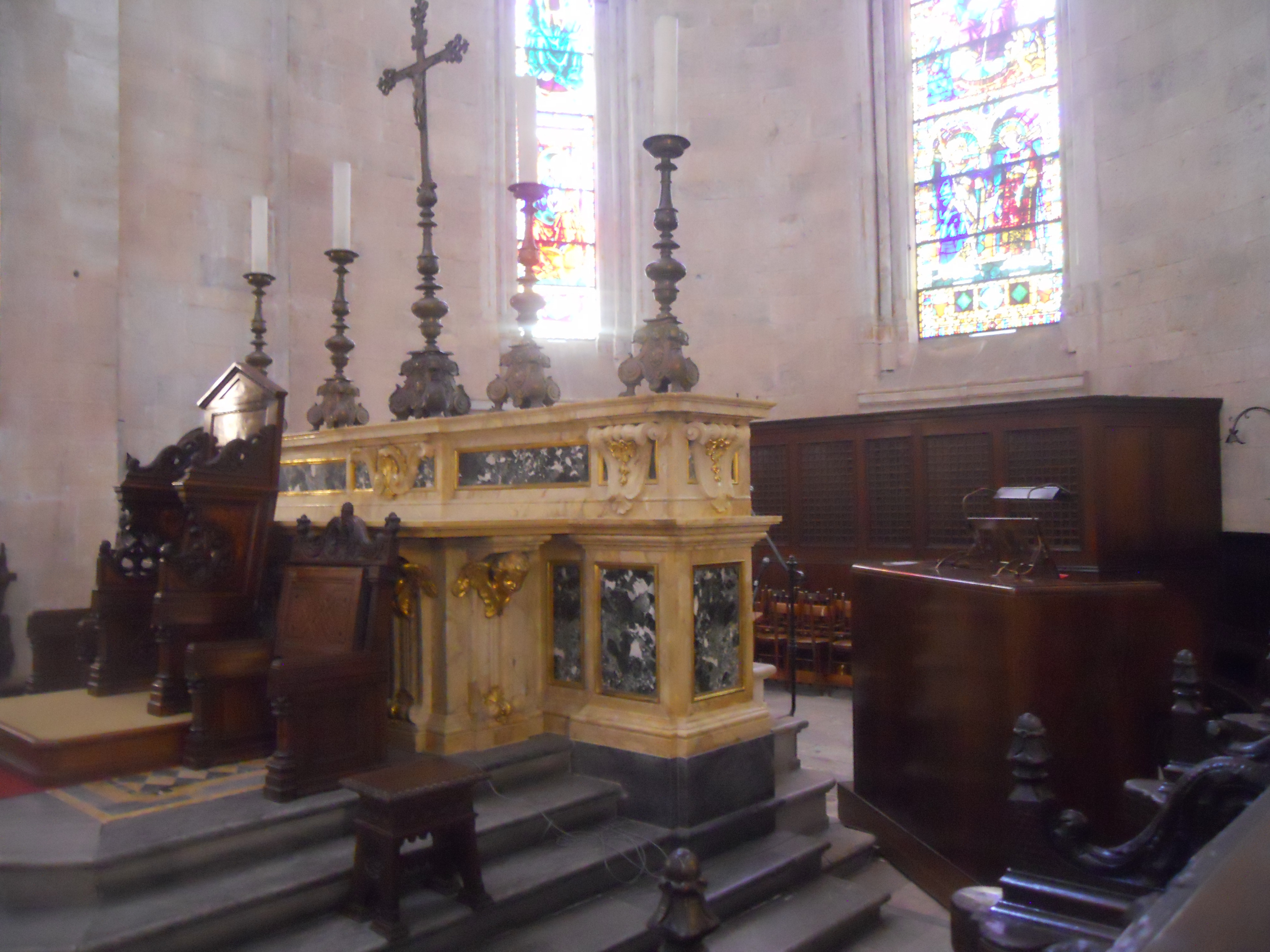 L'altare maggiore barocco e il corpo corale e la consolle dell'organo Mascioni opus 775 (III+P/48) della cattedrale di San Martino a Lucca.